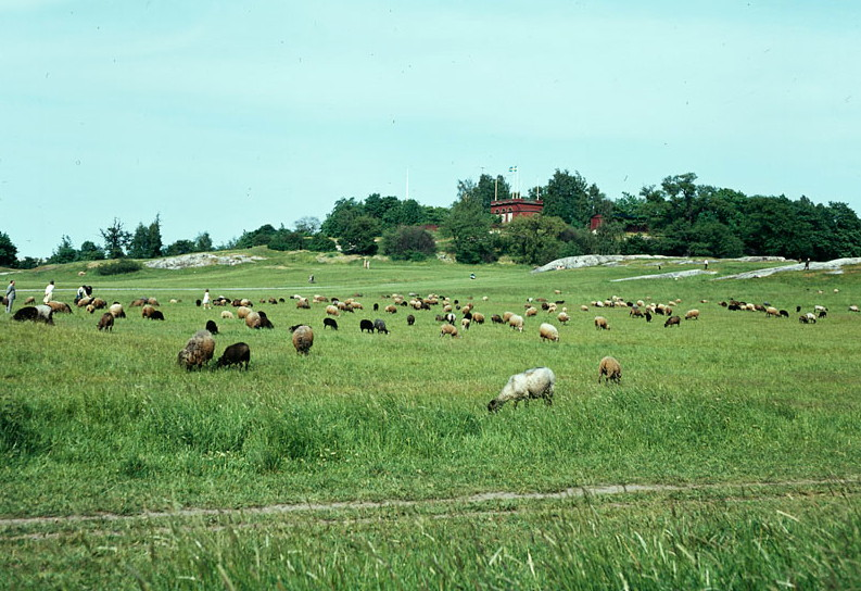 Ladugårdsgärde med utsikt mot Drottningberget